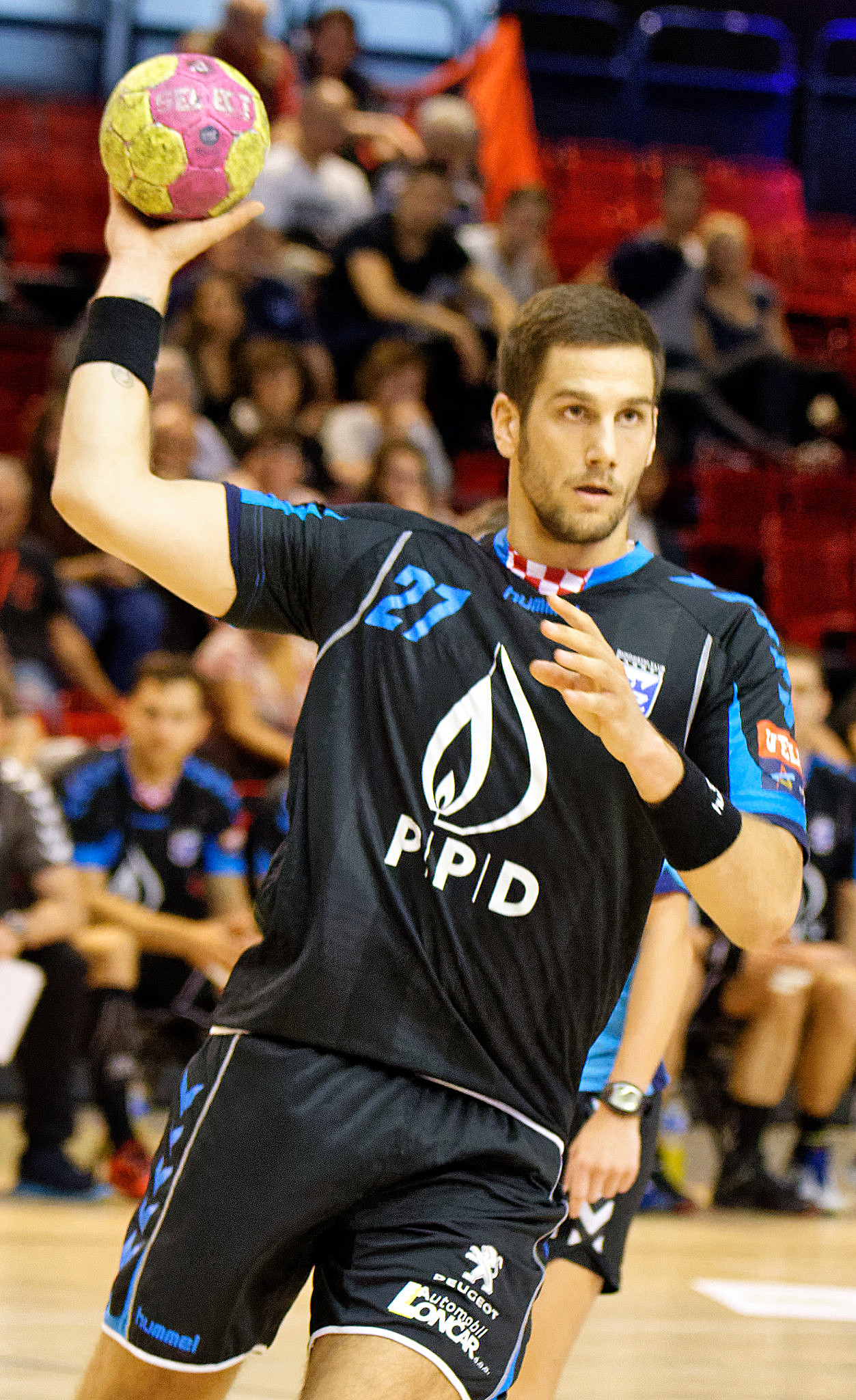 Rencontre du challenge Marrane 2016 entre l'US Dunkerque et les croates du RK Zagreb